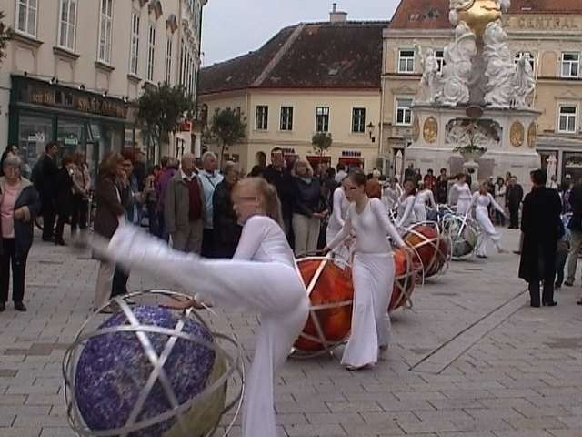 Tanzperformance der Gruppe Ladies-first-Ladies und den Rolling STars and Planets